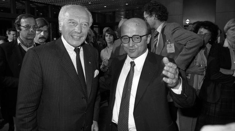 Bundestagswahl: Wahlparty im Bundeskanzleramt